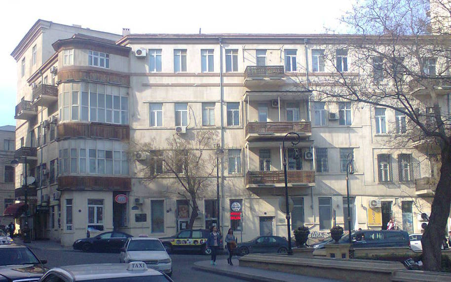 В этом доме жил Адиль Эфендиев (при более детальном рассмотрении можно даже увидеть памятную доску)